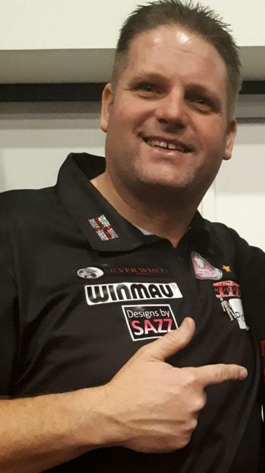 Scott Mitchell op de Dutch Open 2018